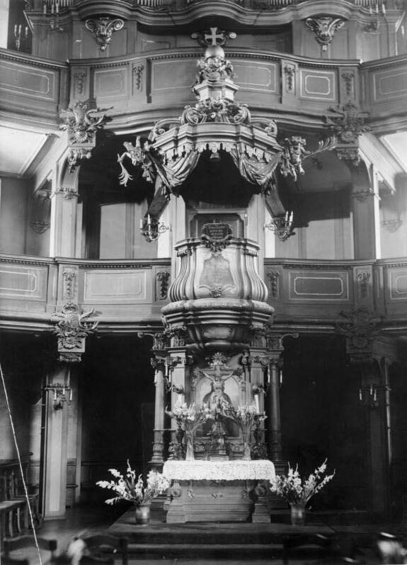 Berlin, Dreifaltigkeitskirche ADN-ZB-Archiv Altar und Kanzel der Dreifaltigkeitskirche in der Mauerstraße Aufnahme 1939 11468-39 [Scherl Bilderdienst]